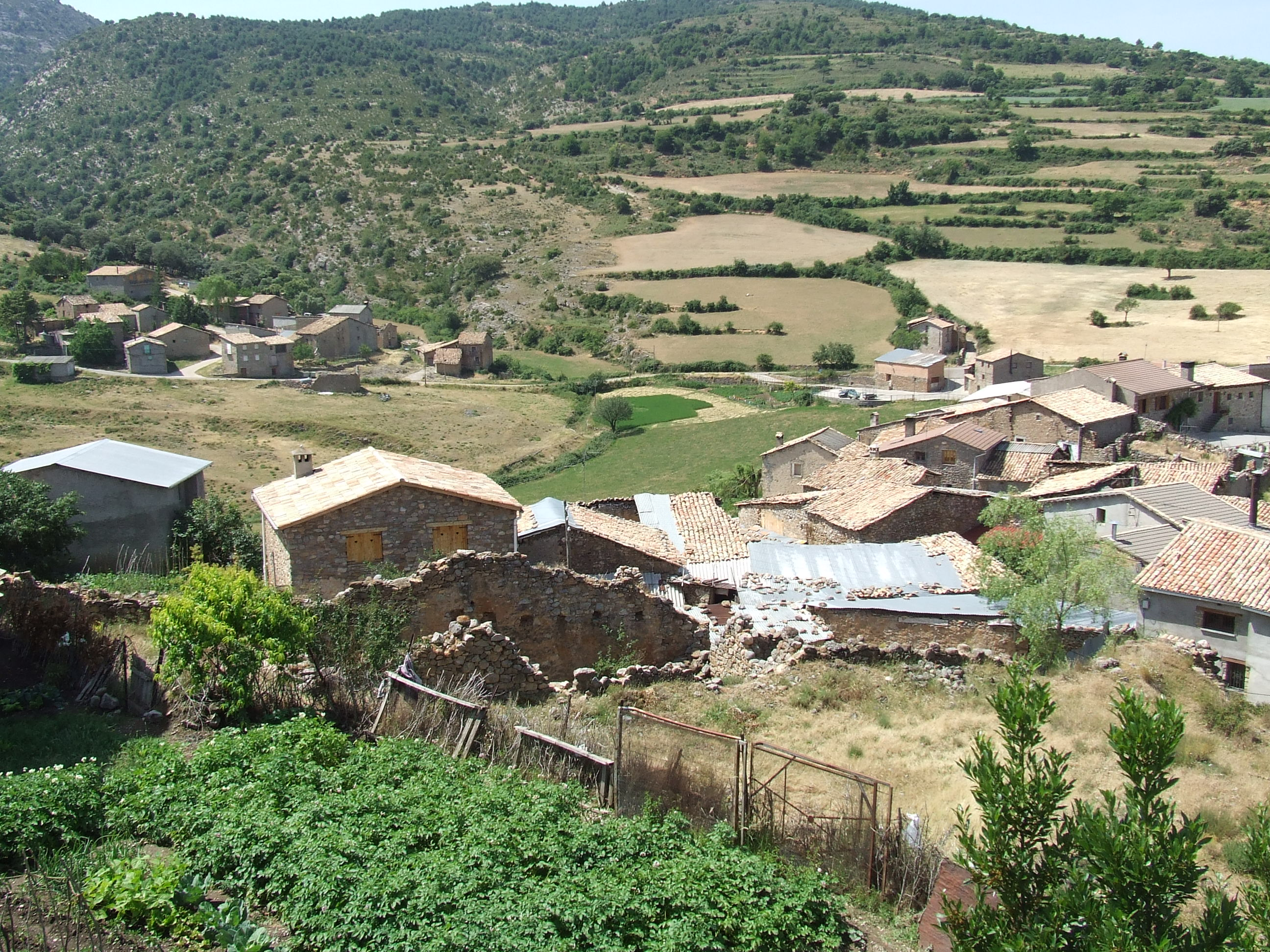 El Tros de la Font, a Hortoneda (Conca de Dalt, Pallars Jussà)